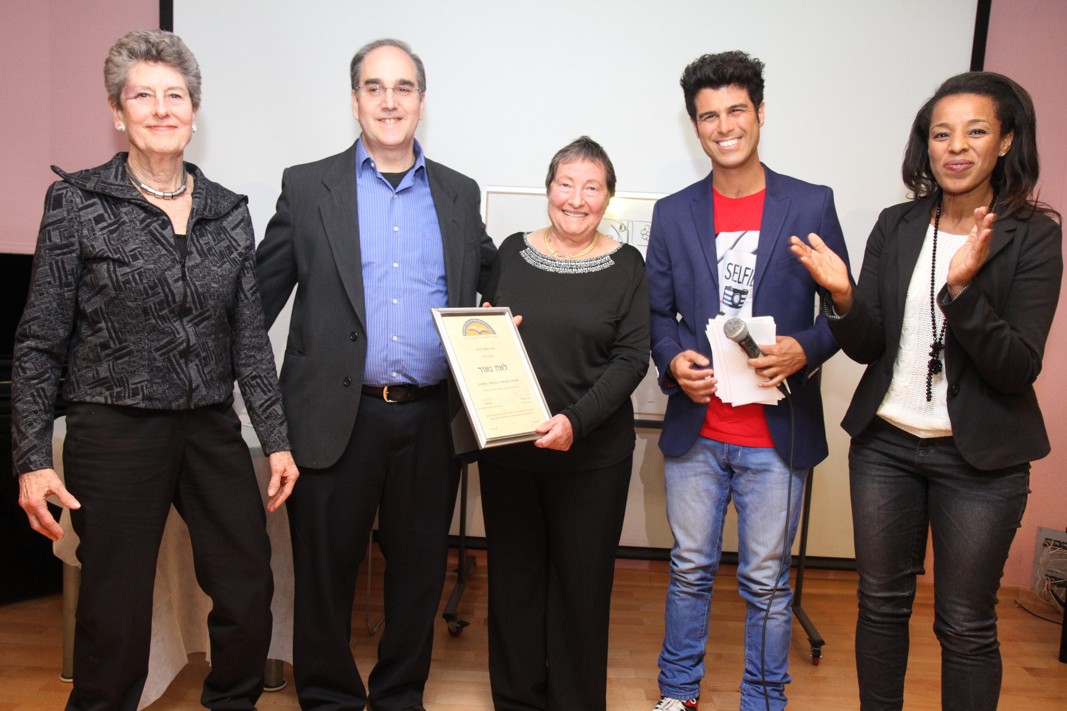 כנס חדשנות בחינוך בנתניה.